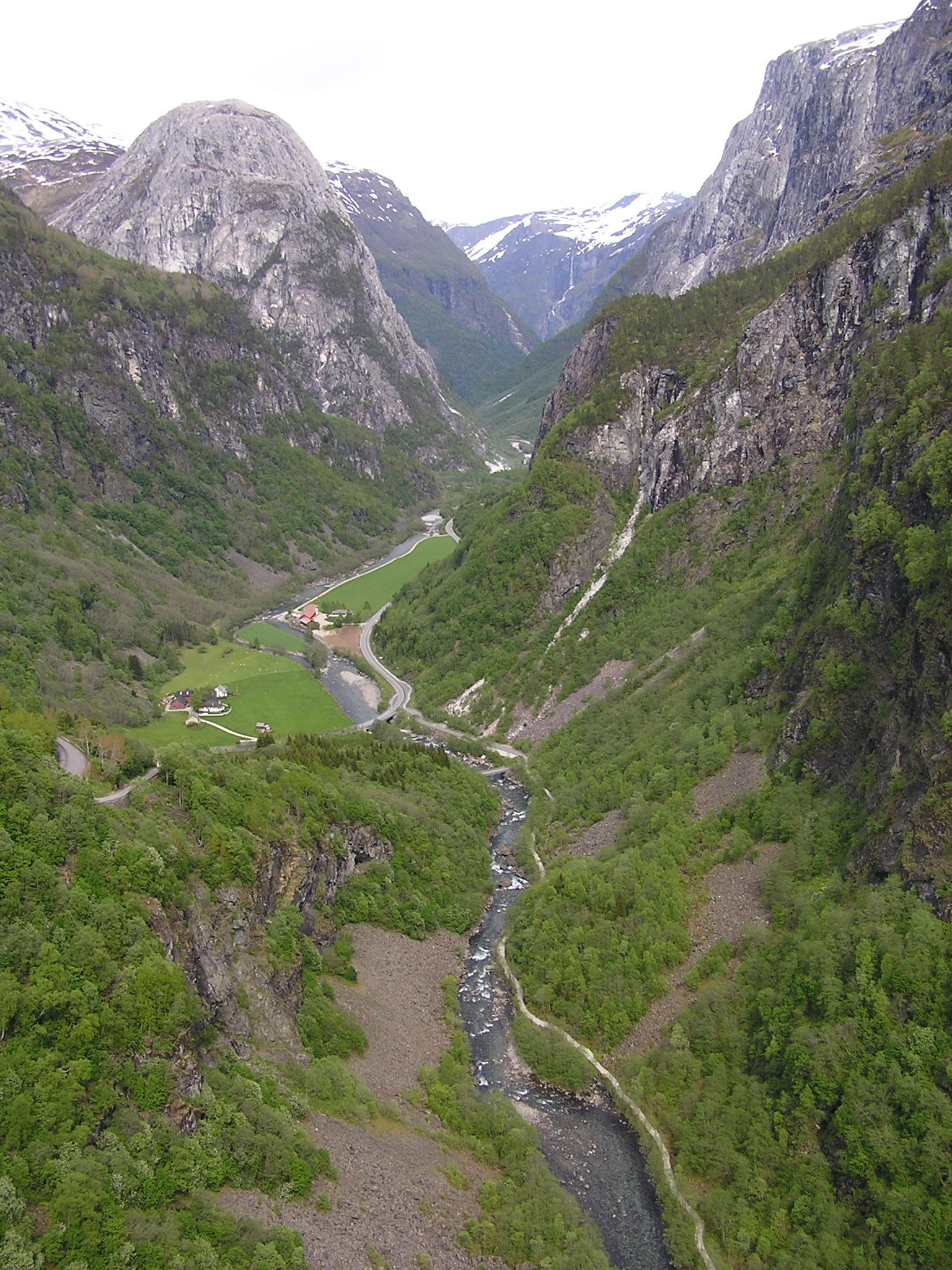 Stalheim.